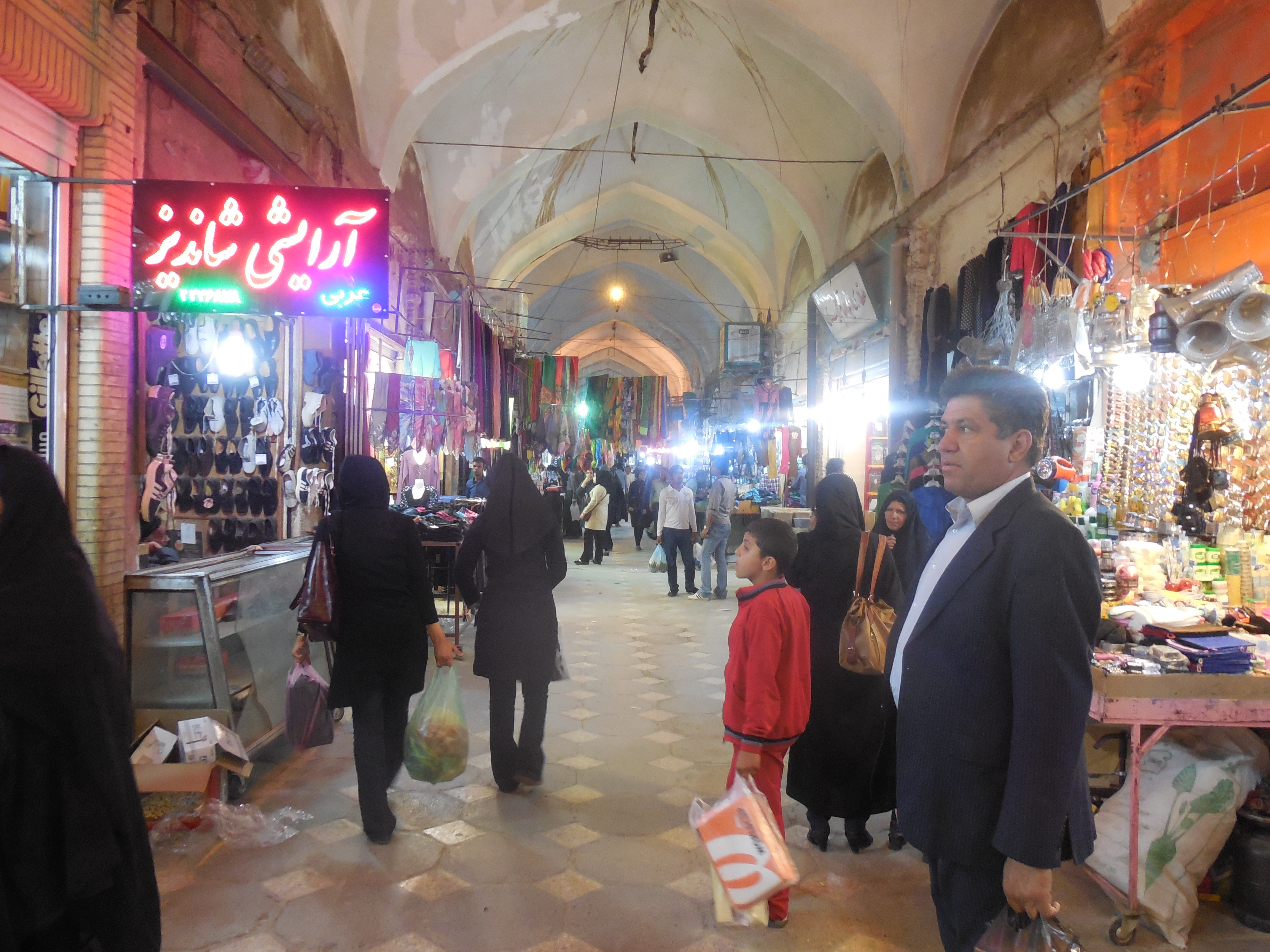 Basar